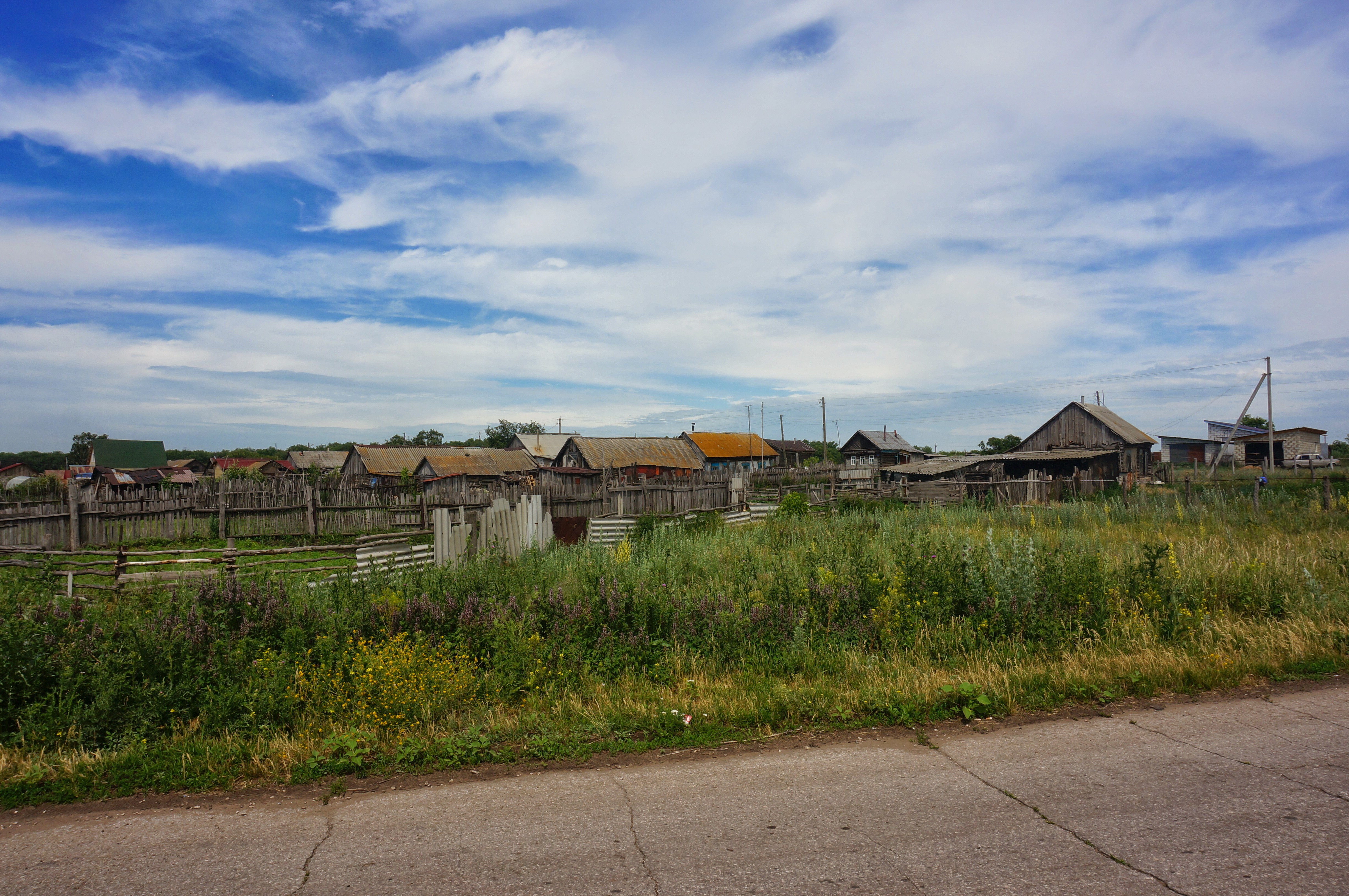 Посёлок Дубравка, Мелекесский район Ульяновской области